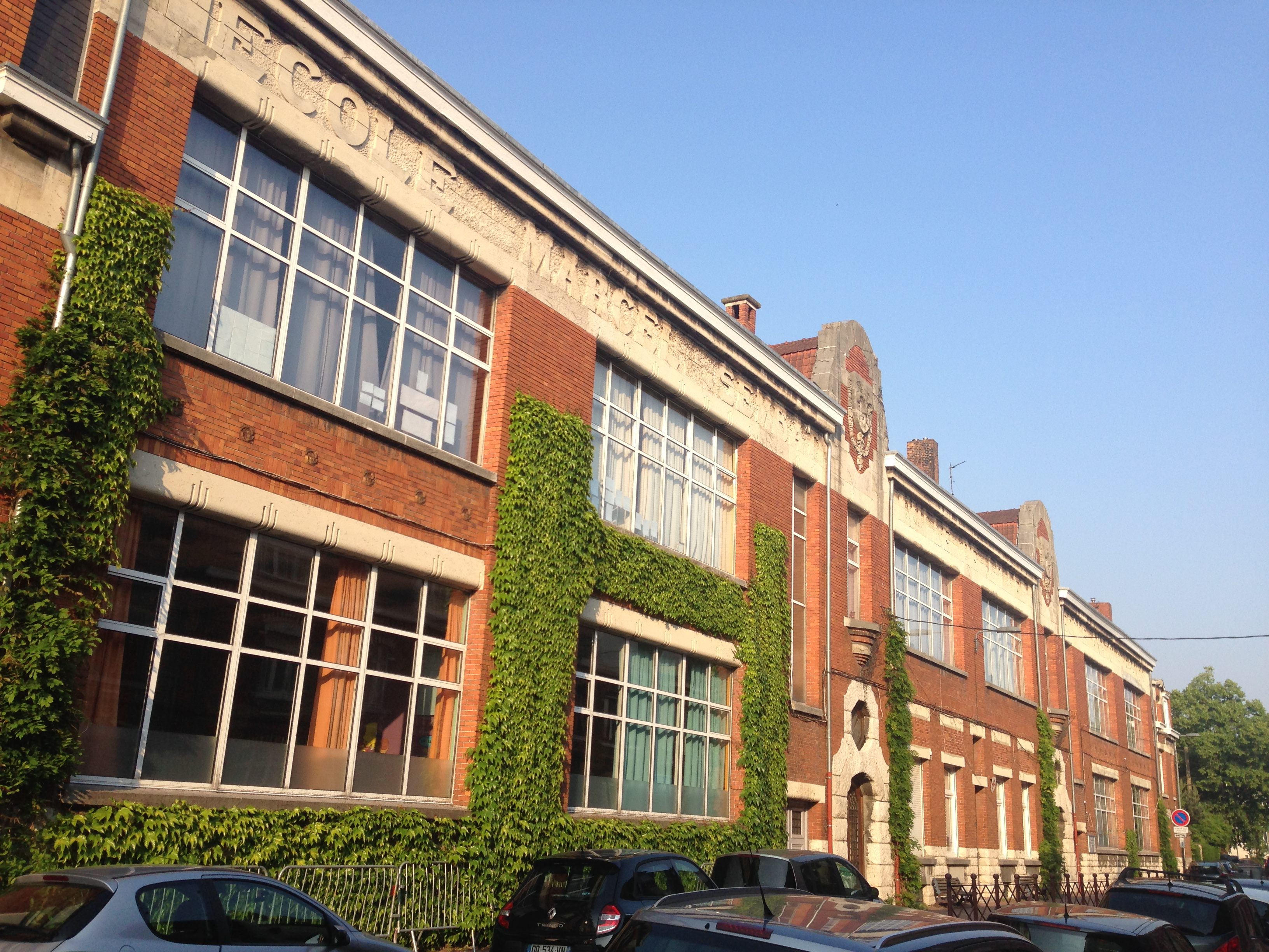 majestueux groupe scolaire Marcel Sembat-Anatole France, qui fut construit avec l’école maternelle Jules Simon par l’architecte Léonce Quesnoy de 1926 à 1931 rue Alphonse Leroy Saint Maurice Pellevoisin